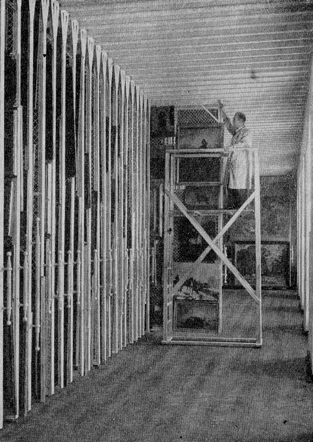 Wnętrze magazynu malarstwa Muzeum Narodowego w Warszawie (1966r.).